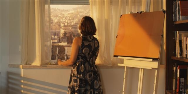 חגית דסברג בסרט "החיים בינתיים"